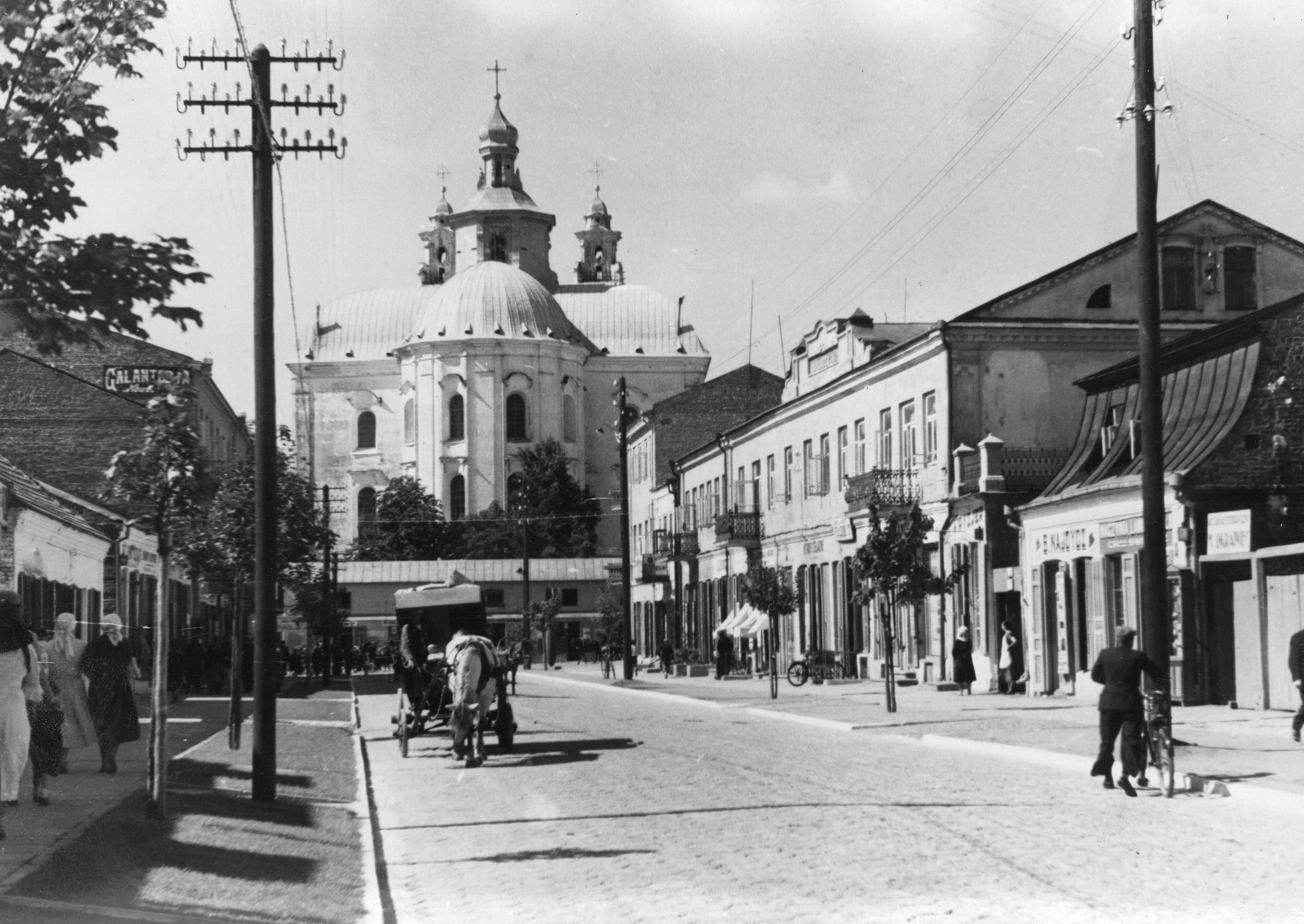 Беларуская (тарашкевіца): Пінск (Pinsk), вуліца Вялікая (vulica Vialikaja), Спаская / Францішканская (Spaskaja / Franciškanskaja)